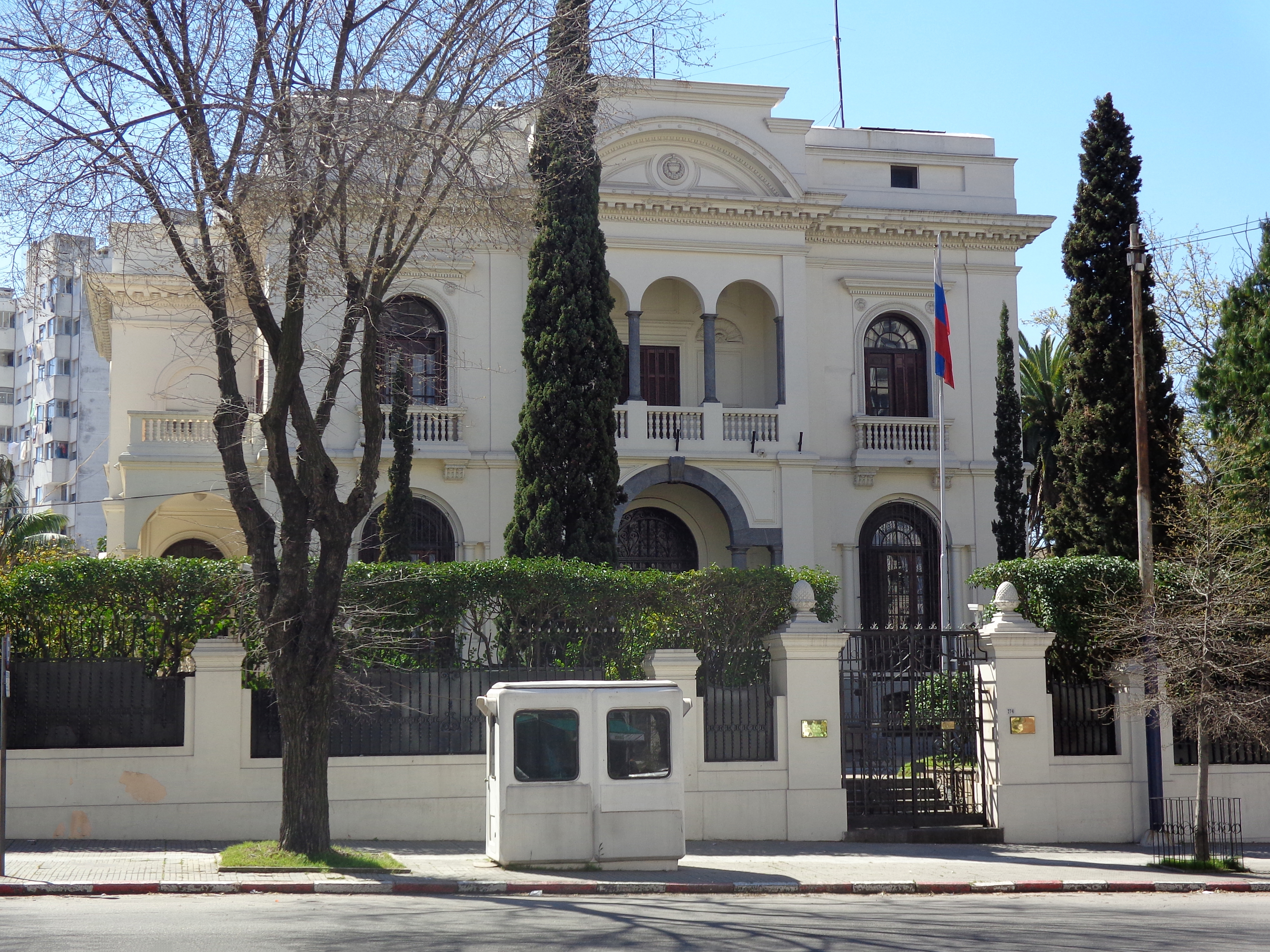 Embajada Rusa. Ubicada en el departamento de Montevideo